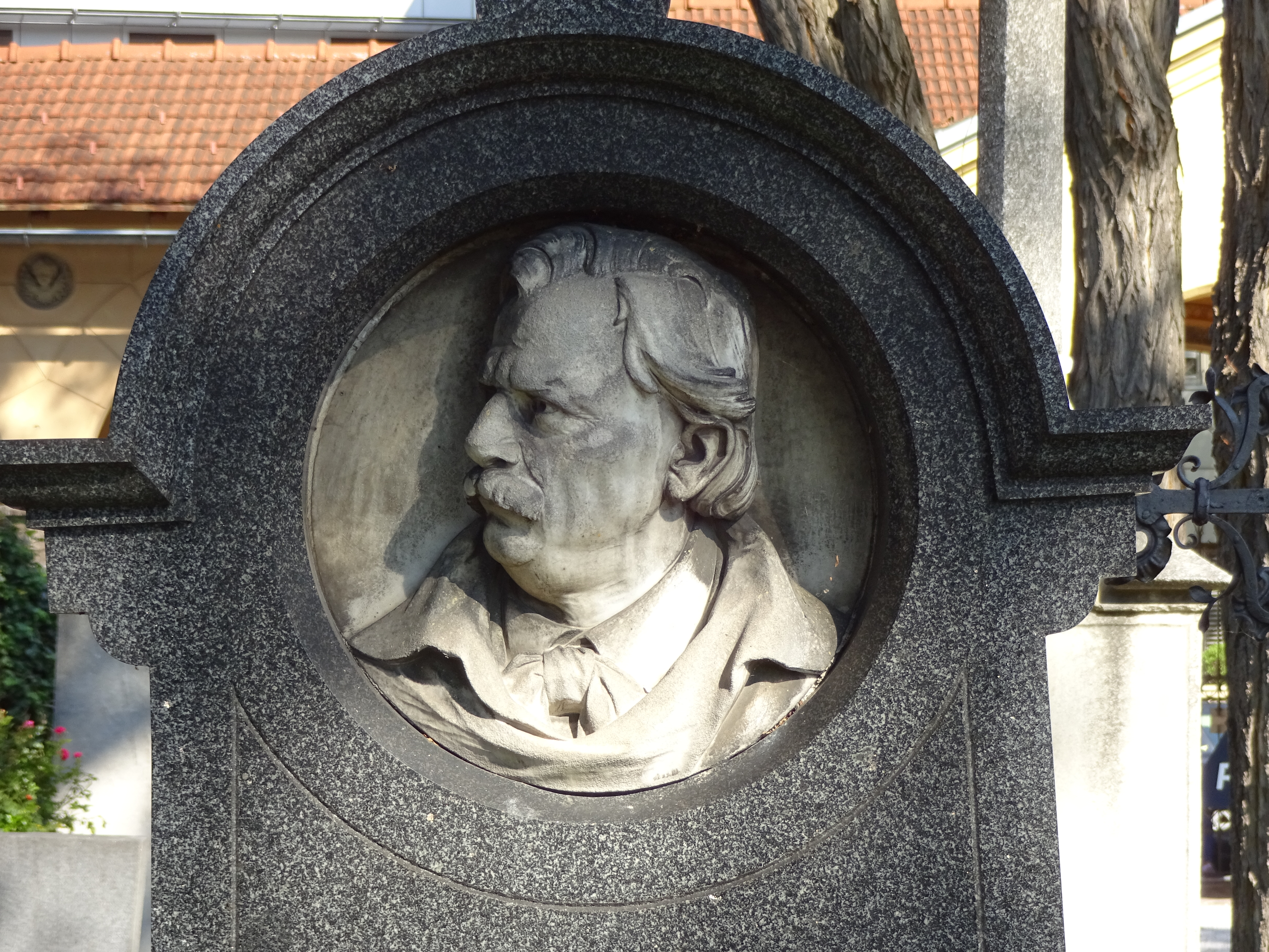 Westfriedhof Innsbruck, Gräberfeld im nördlichen Teil, Grab von Matthäus Nagiller, Portraitrelief